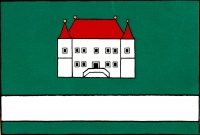 Boskovštejn, vlajka. List tvoří tři vodorovné pruhy, zelený, bílý a zelený, v poměru 7 : 2 : 1. V horním zeleném pruhu bílá patrová budova zámku s valbovou střechou se dvěma makovicemi a s dvěma nárožními věžicemi se stanovými střechami s makovicemi, střechy červené, makovice žluté. Zámek má oboustranné schodiště, v přízemí dveře a čtyři okna, v patře pět oken, věžice po okně v patře, dveře a okna černá. Poměr šířky k délce listu je 2 : 3.